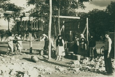 Снимка на кладенец в с. Люляково, Толбухинско (Добричко), и жители от селото.